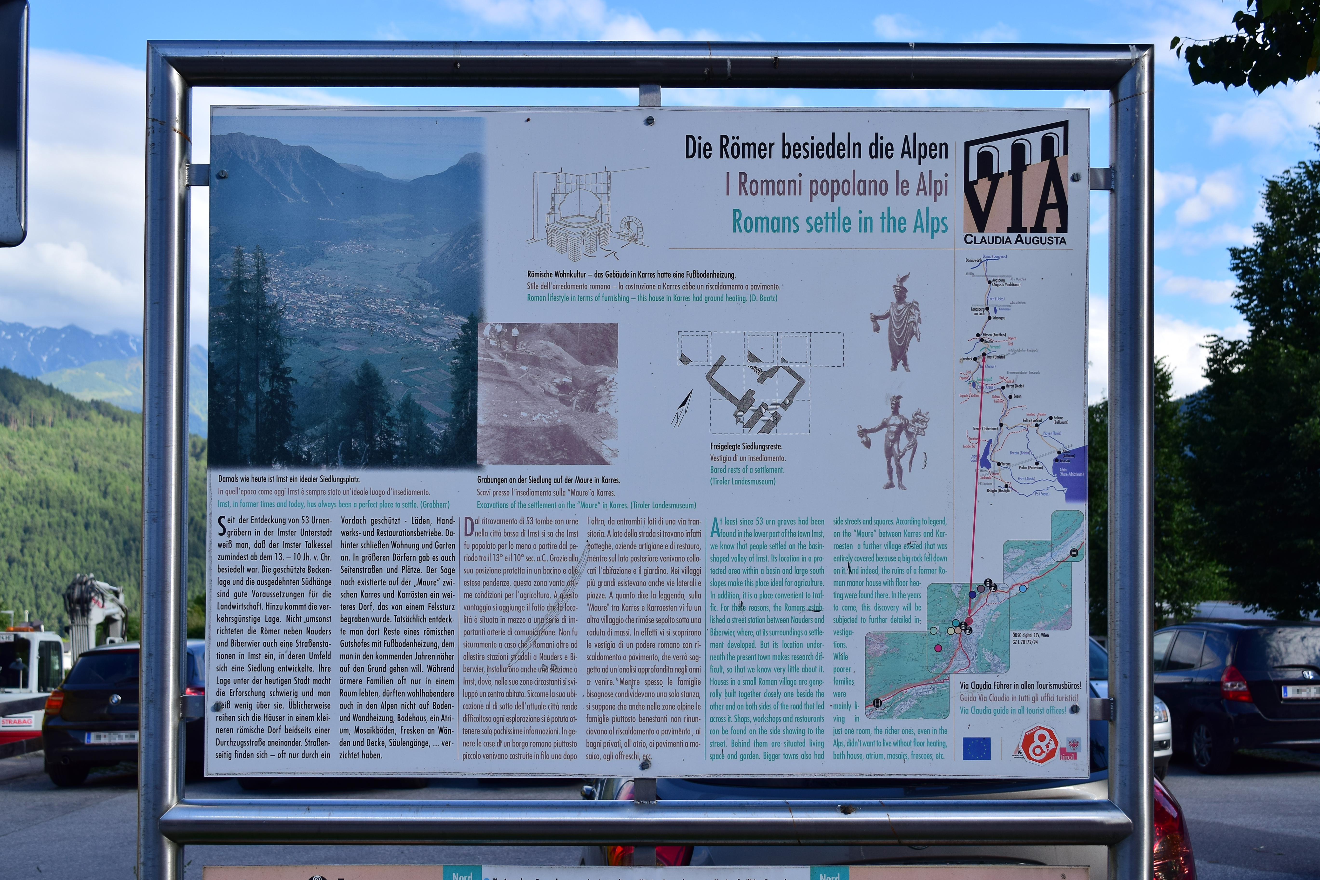 Infotafel "Die Römer besiedeln die Alpen" in Imst